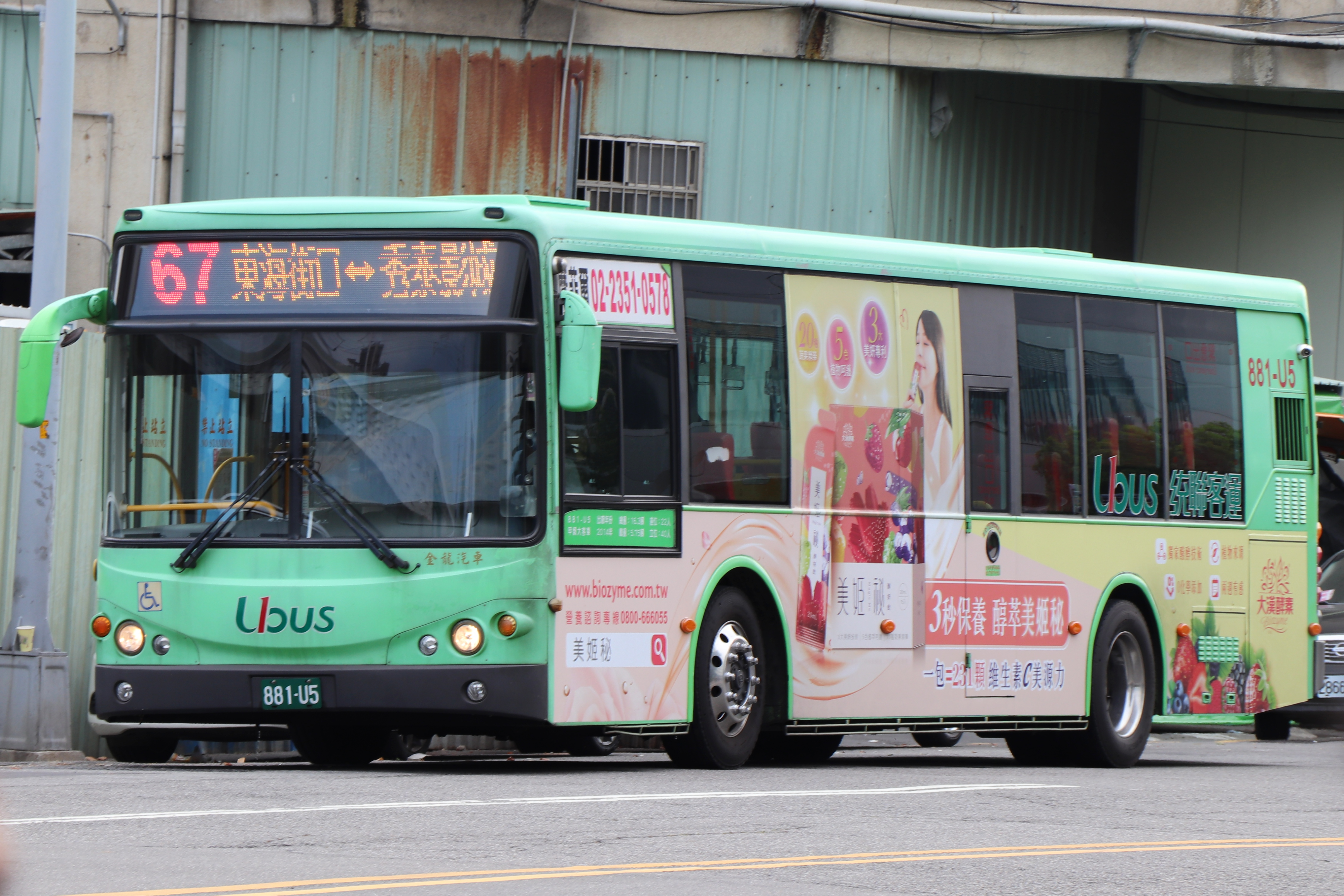 統聯客運代駛台中市公車67路 攝於2020/07/26。